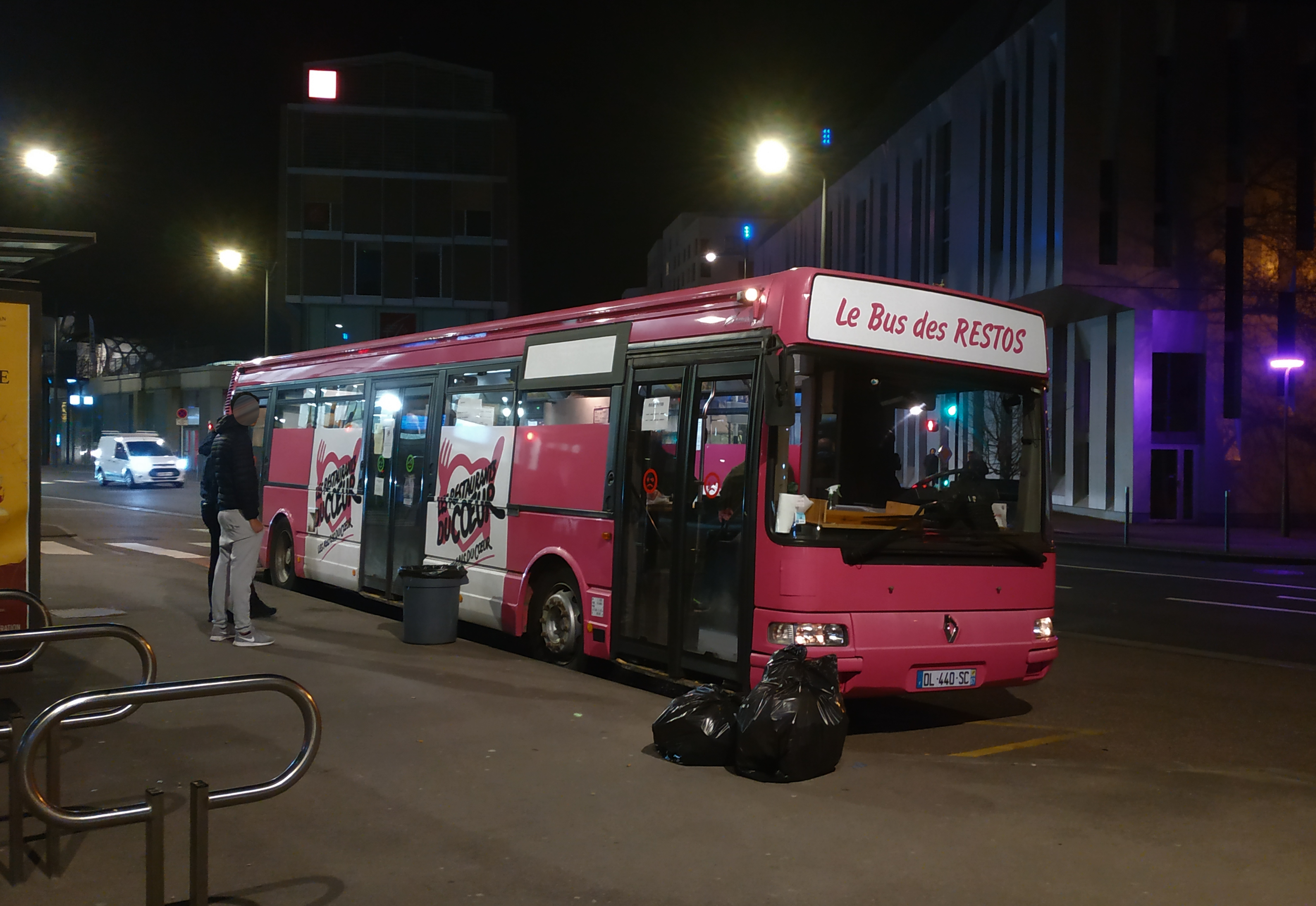 Autobus Les Restos du coeur à Metz